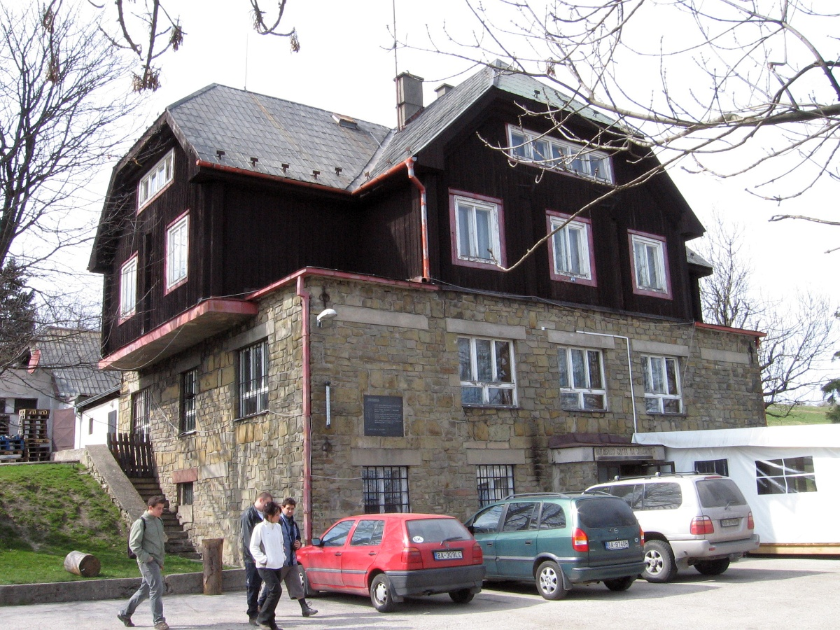 Holubyho chata pod Velkou Javořinou